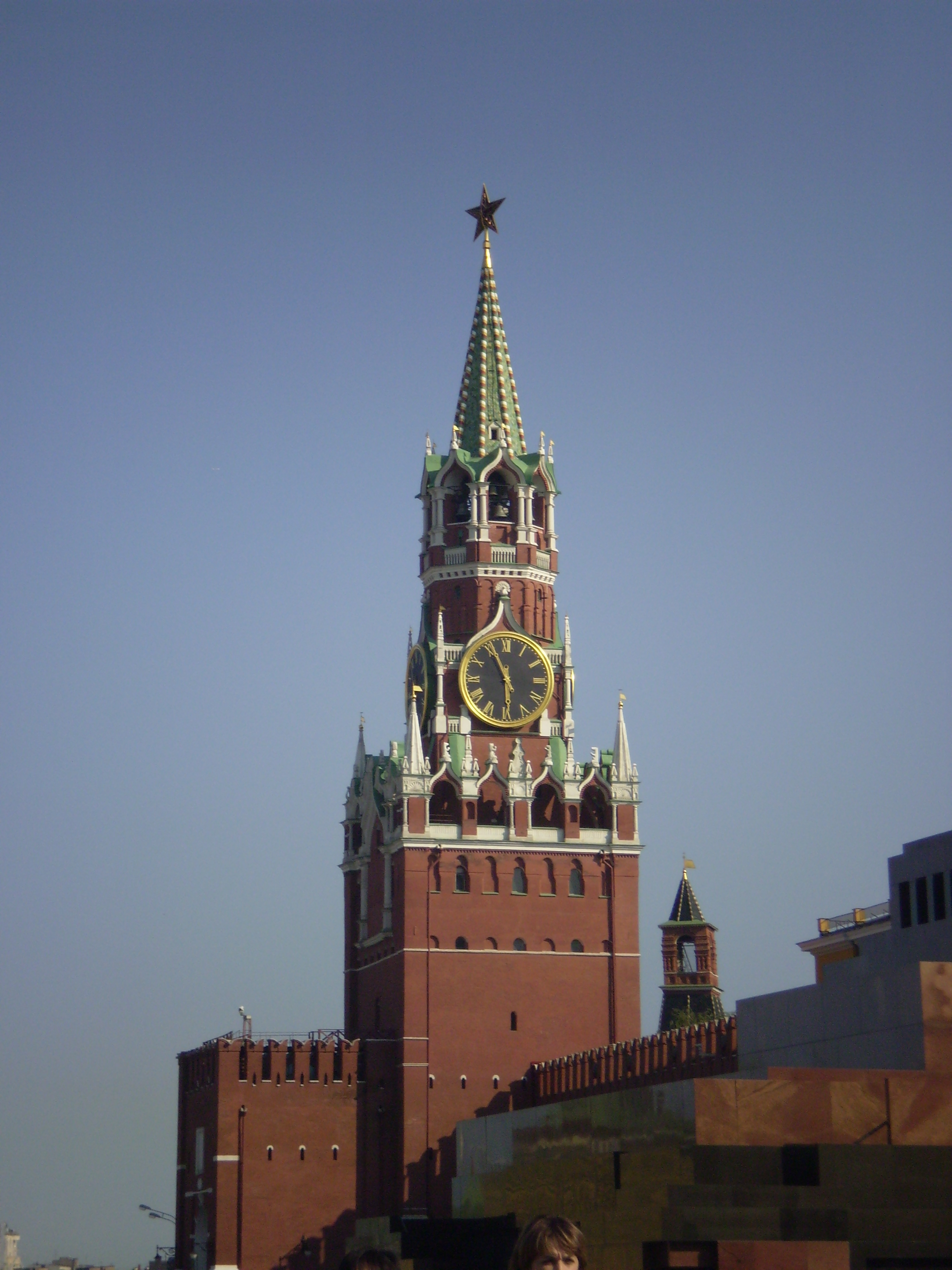 Спасская башня